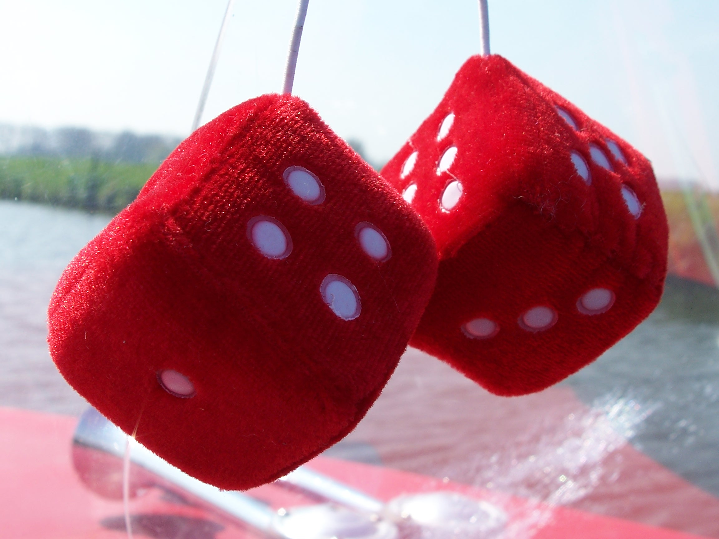 Dices, self made picture.